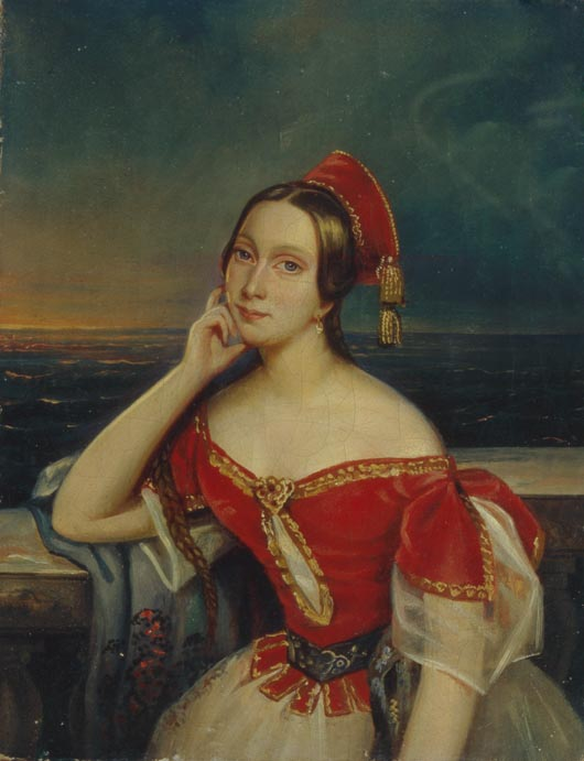 Мария Тальони (Taglioni) (23.4.1804, Стокгольм - 22.4.1884, Марсель), итальянская артистка, балетмейстер, педагог.